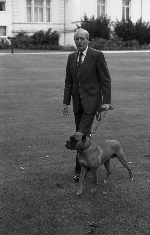 Bundespräsident Karl Carstens mit Hund Ben